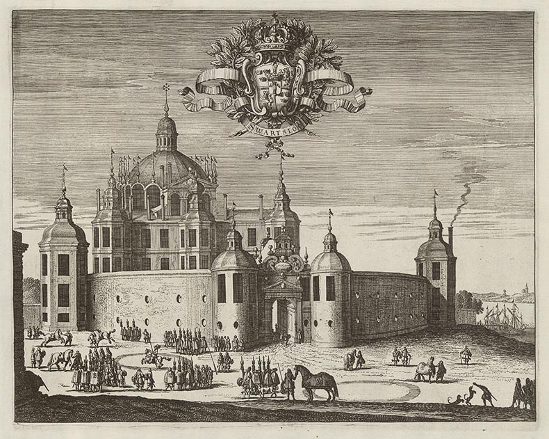 Engraving from Suecia Antiqua et Hodierna, view of Svartsjö Palace.